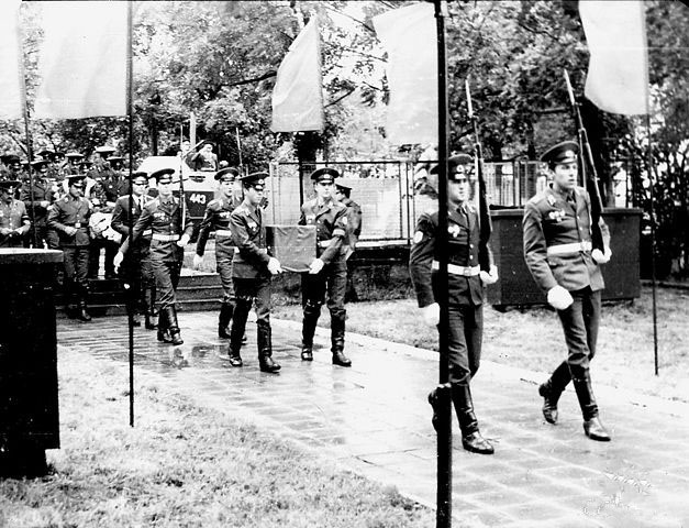 Перезахоронение капитана Володькина, 39 гв. мсд, Ордруф